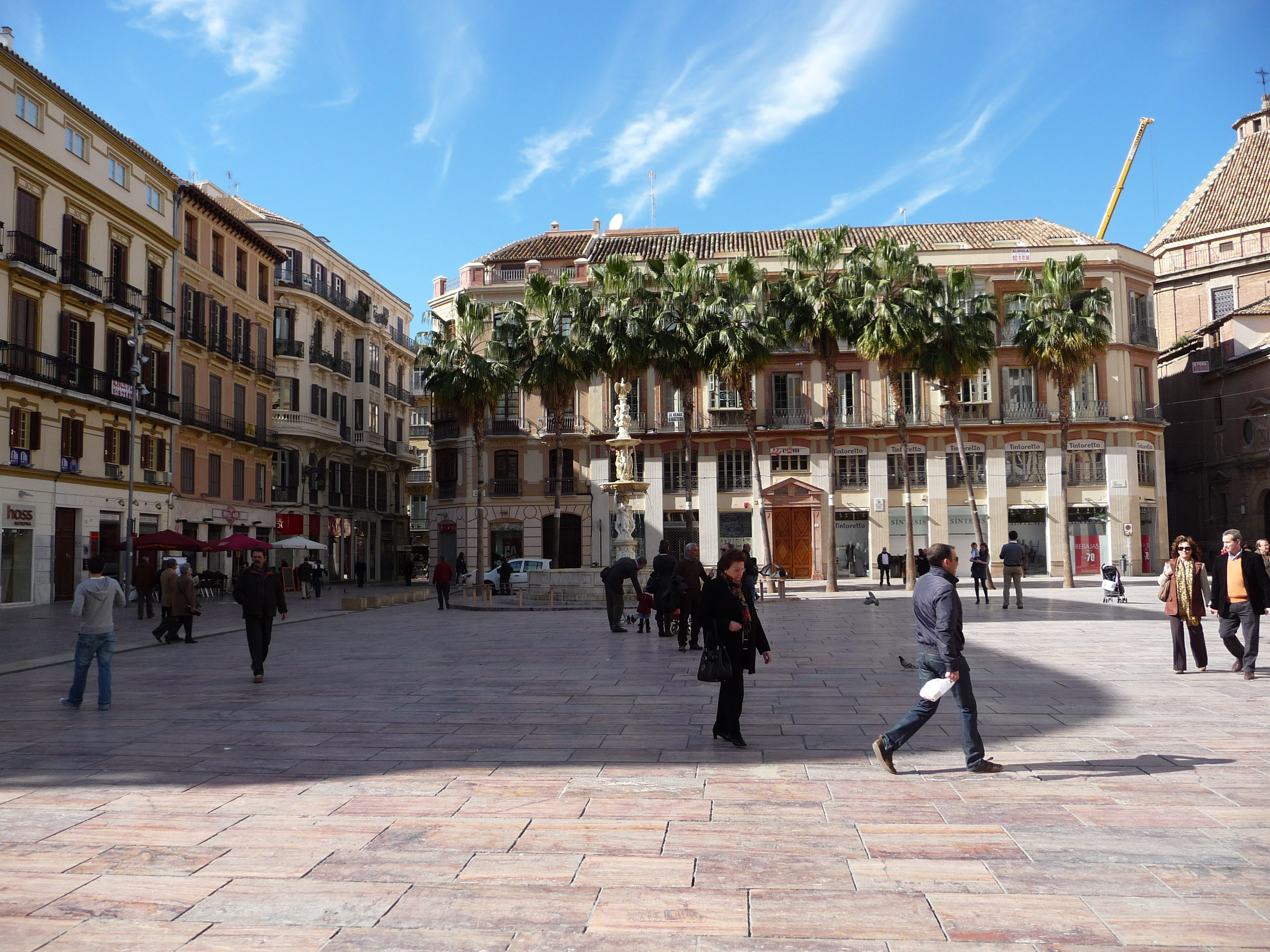 Plaza de la Constitución